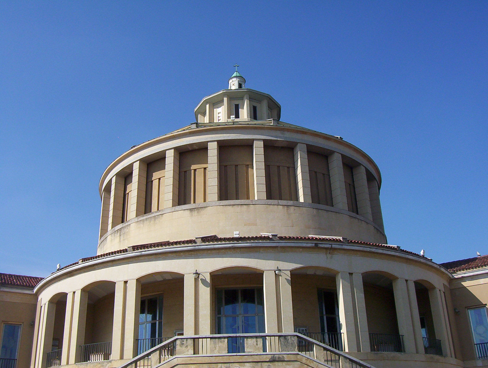 Forte San Leonardo a Verona